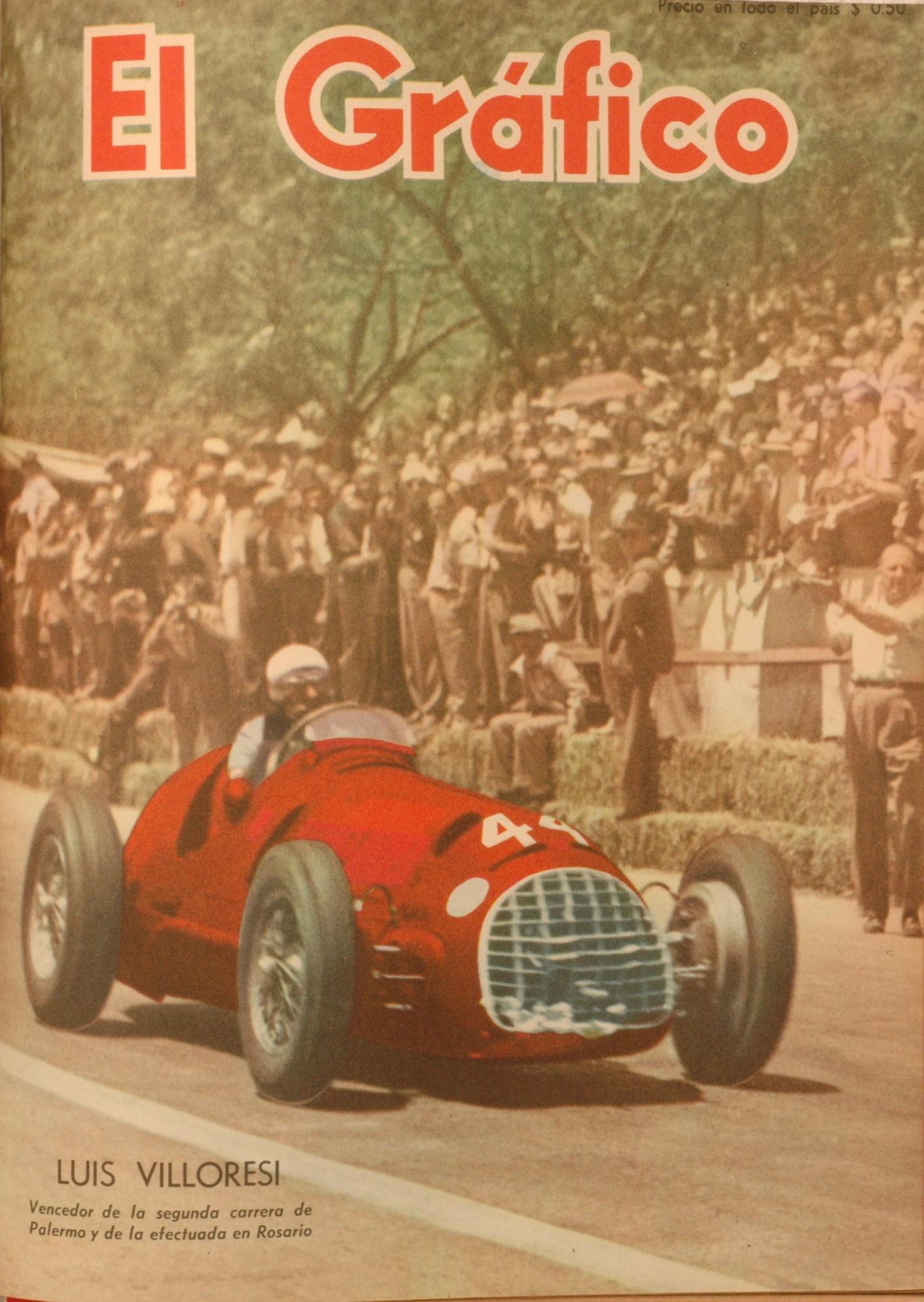 El Grafico del 03 de Febrero de 1950. Edicion 1591